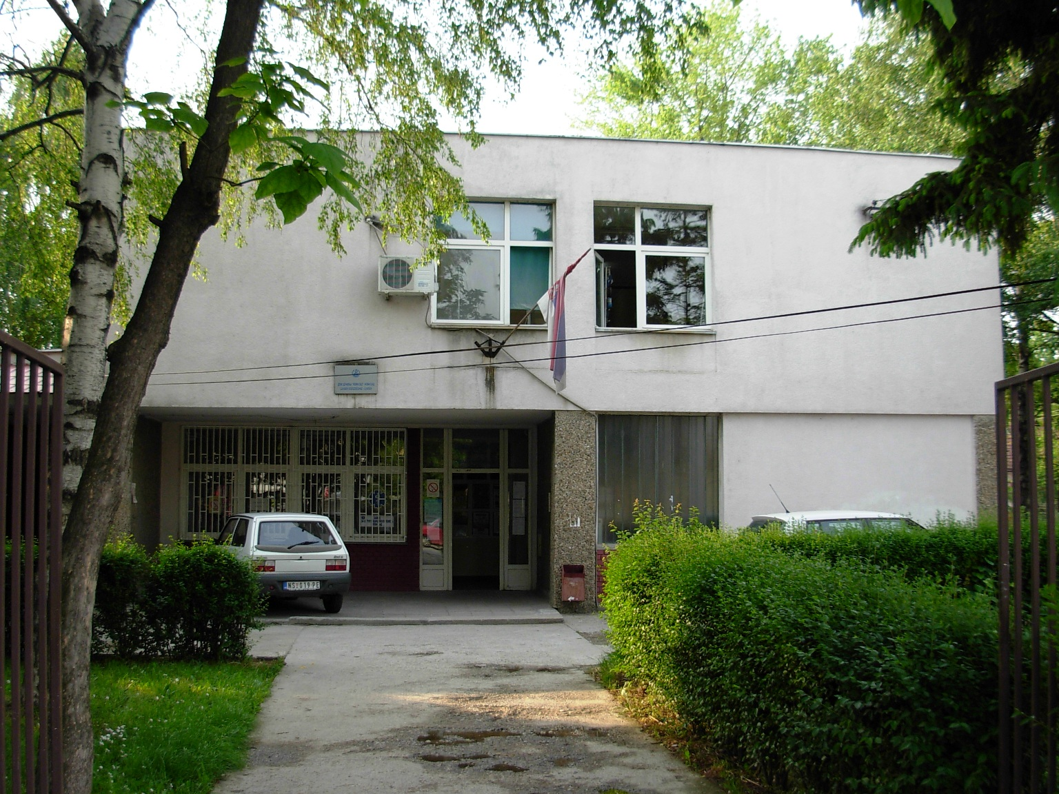 Dom zdravlja u Vršačkoj ulici u Novom Sadu.